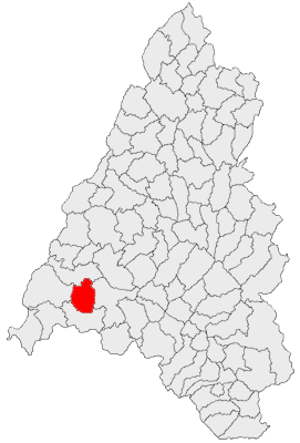 Categorie:Hărţi ale judeţului Bihor